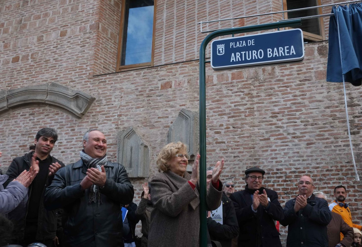 Vecino de Lavapiés y exiliado tras la Guerra Civil en Inglaterra donde falleció, Arturo Barea, el inolvidable escritor de la trilogía La forja de un rebelde, vuelve a su barrio, a ese “Avapiés” como él lo denominaba en su obra. el 4 de abril de 2017 la alcaldesa de Madrid, Manuela Carmena, acompañada por el embajador de Reino Unido en España, Simon John Manley, y el concejal de Centro, Jorge García Castaño, ha descubierto la placa con el nombre del escritor que, desde hoy sábado, da nombre a la plaza, antes conocida popularmente como plaza de Agustín Lara y situada en la confluencia de las calles del Sombrerete y Mesón de Paredes, frente a las Escuelas Pías en las que estudió el escritor.